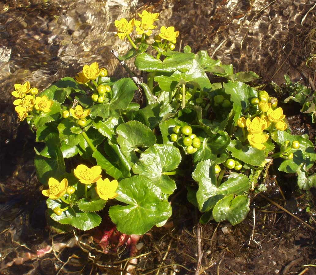 Caltha palustris, growing at Muggendorf, Niederösterreich, Austria